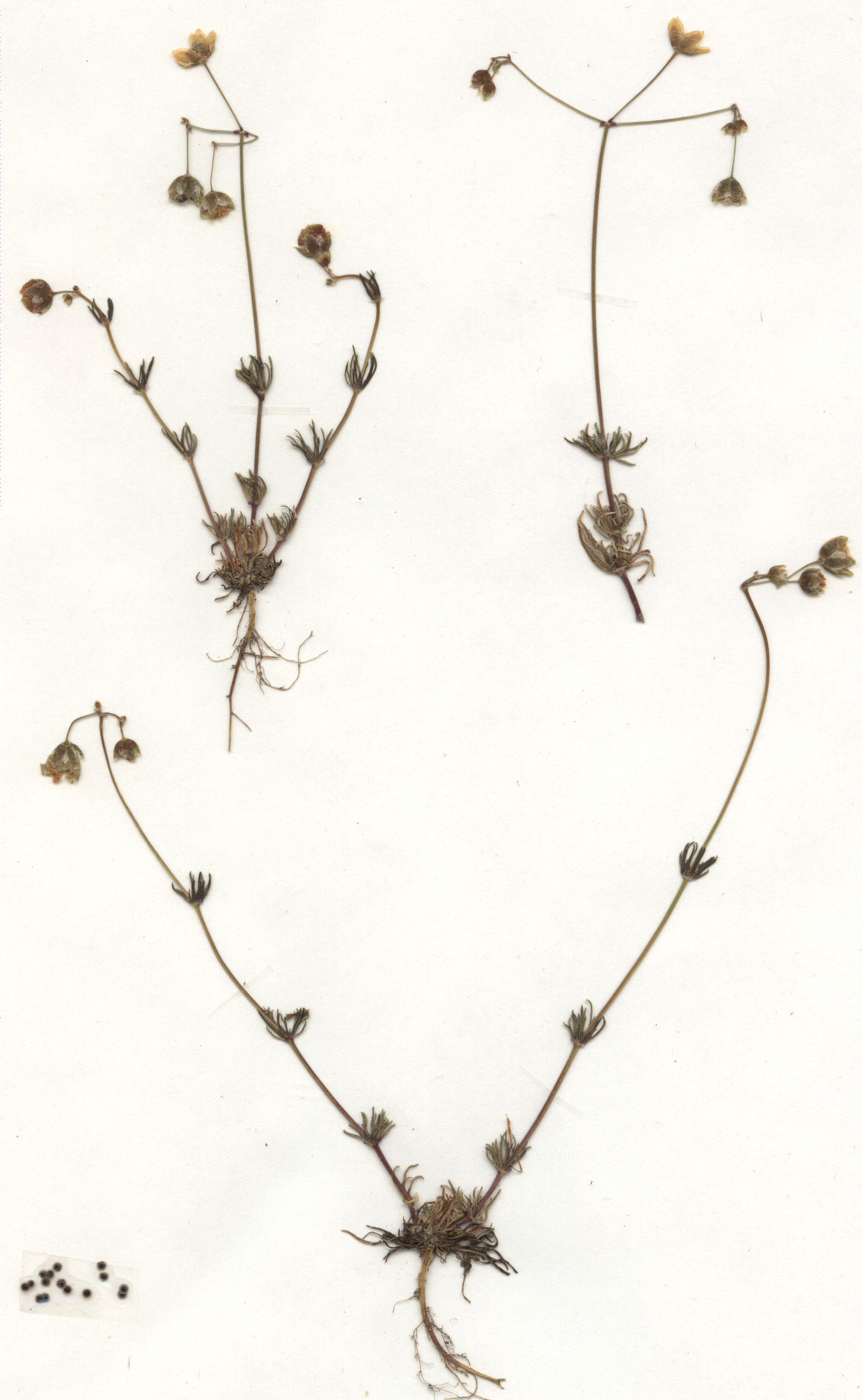 Spergula morisonii, eigener Herbarbeleg von 1987, Unterfranken